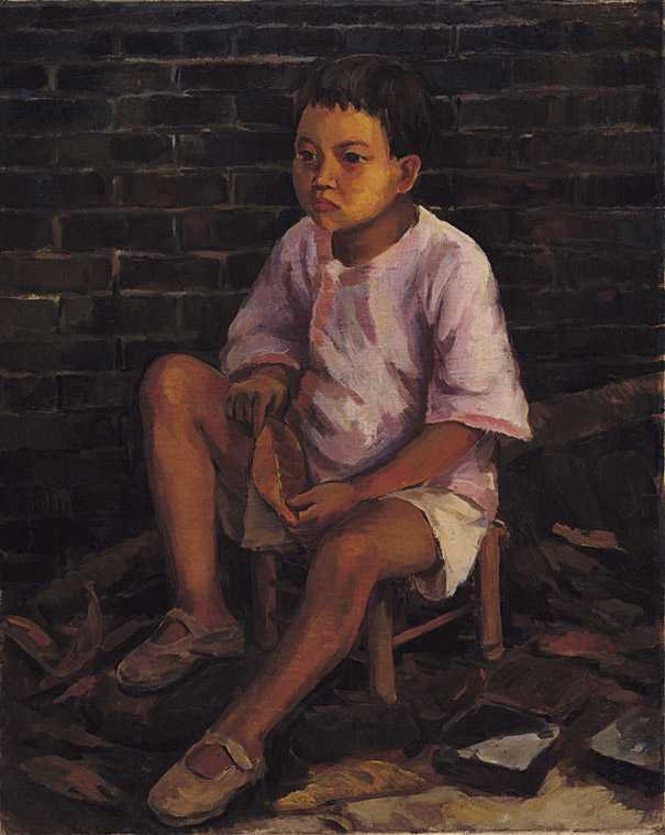 1934年，油畫，91*72公分，主題人物為畫家長女麗霞，創作於李梅樹自東京美術學校畢業返台不久的時間。